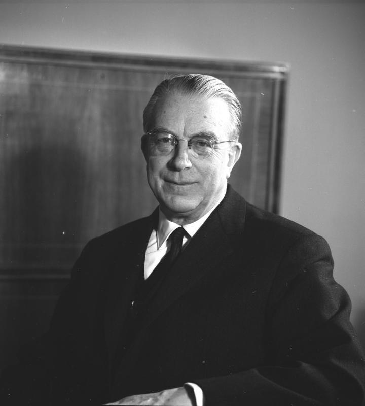 Portraitaufnahmen von Staatssekretär Globke